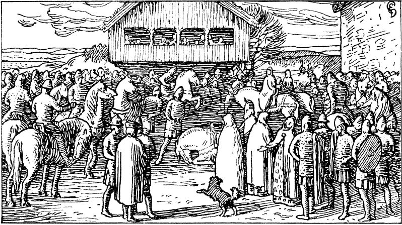 Halfdan Egedius: Illustration for Olav den helliges saga. Snorre 1899-edition. «Ragnvald Jarl og Astrid Kongsdatter kommer til Sarpsborg.» nb: «Ragnvald jarl og Astrid kongsdatter kommer til Sarpsborg.» nn: «Ragnvald jarl og Astrid kongsdotter kjem til Sarpsborg.»